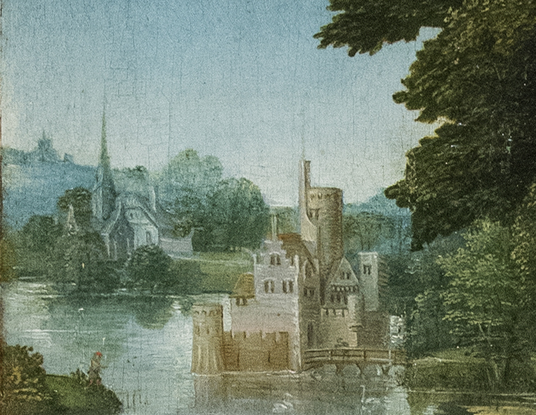 Eigen creatie van twee schilderijen - Gerard Horenbout (ca.1465-1540of1541) Portretten van Lieven van Pottelsberghe, Livina van Steelant en hun kinderen MSK Gent This is a file created at the museum: Museum of Fine Arts in Ghent Wikidata has entry Q26250180 with data related to this item.